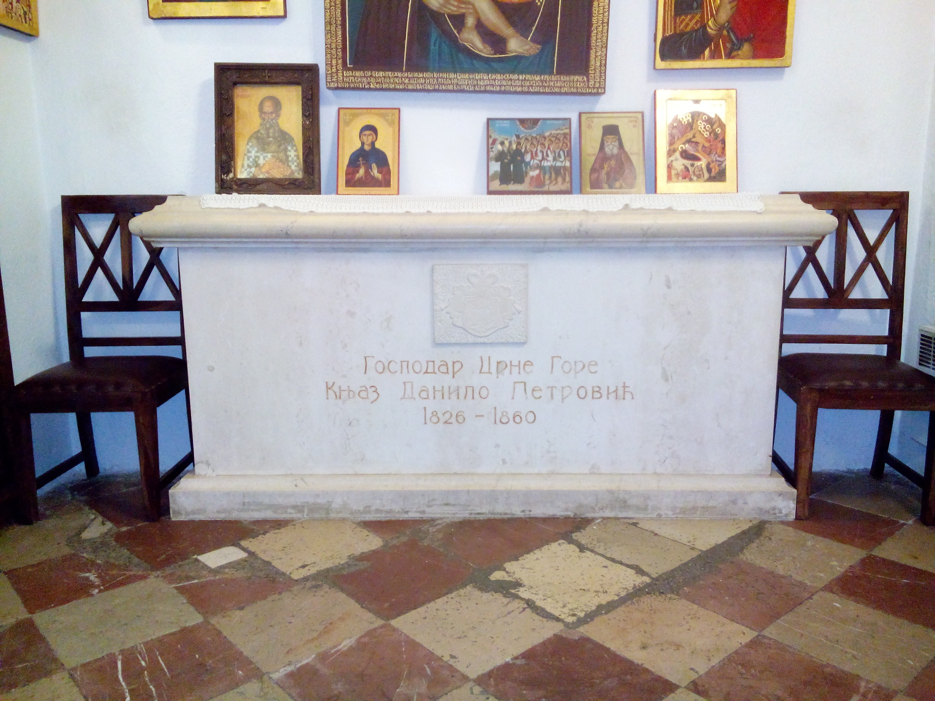 Могила князя Черногории Данилы Петровича (Цетинский монастырь).